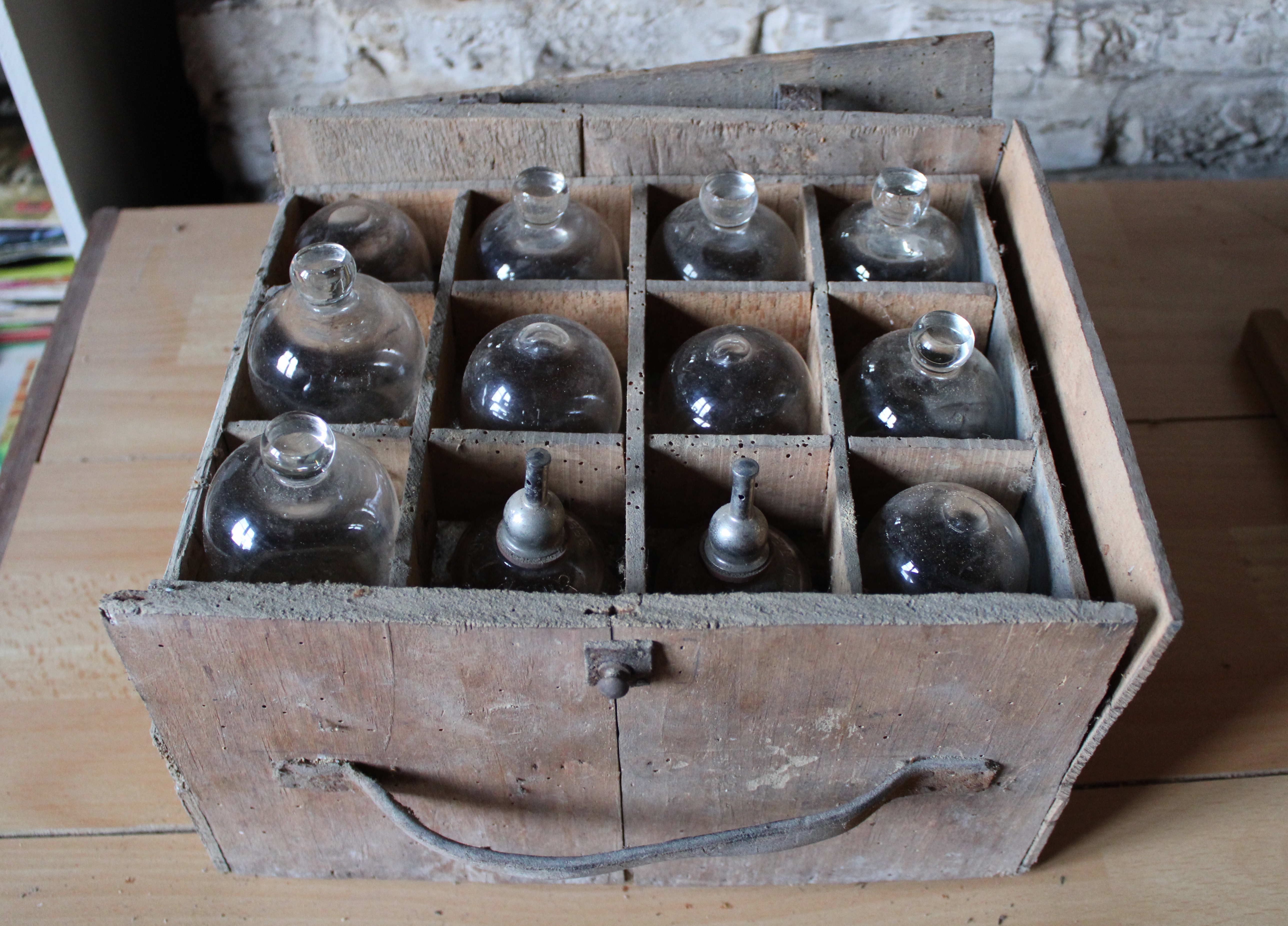 Mallette artisanale de 24 ventouses médicales de 3 modèles différents (collection personnelle)